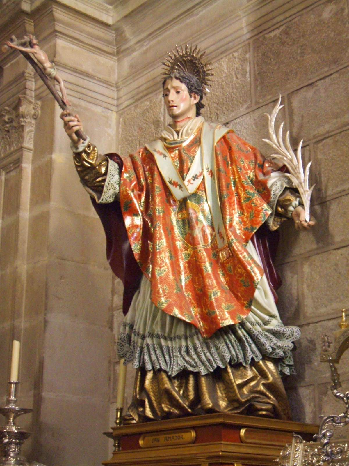 Capilla de la Inmaculada (Catedral de Jaén)